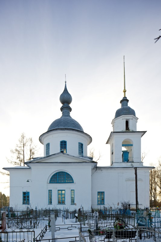 Сергиевская церковь, Вичуга